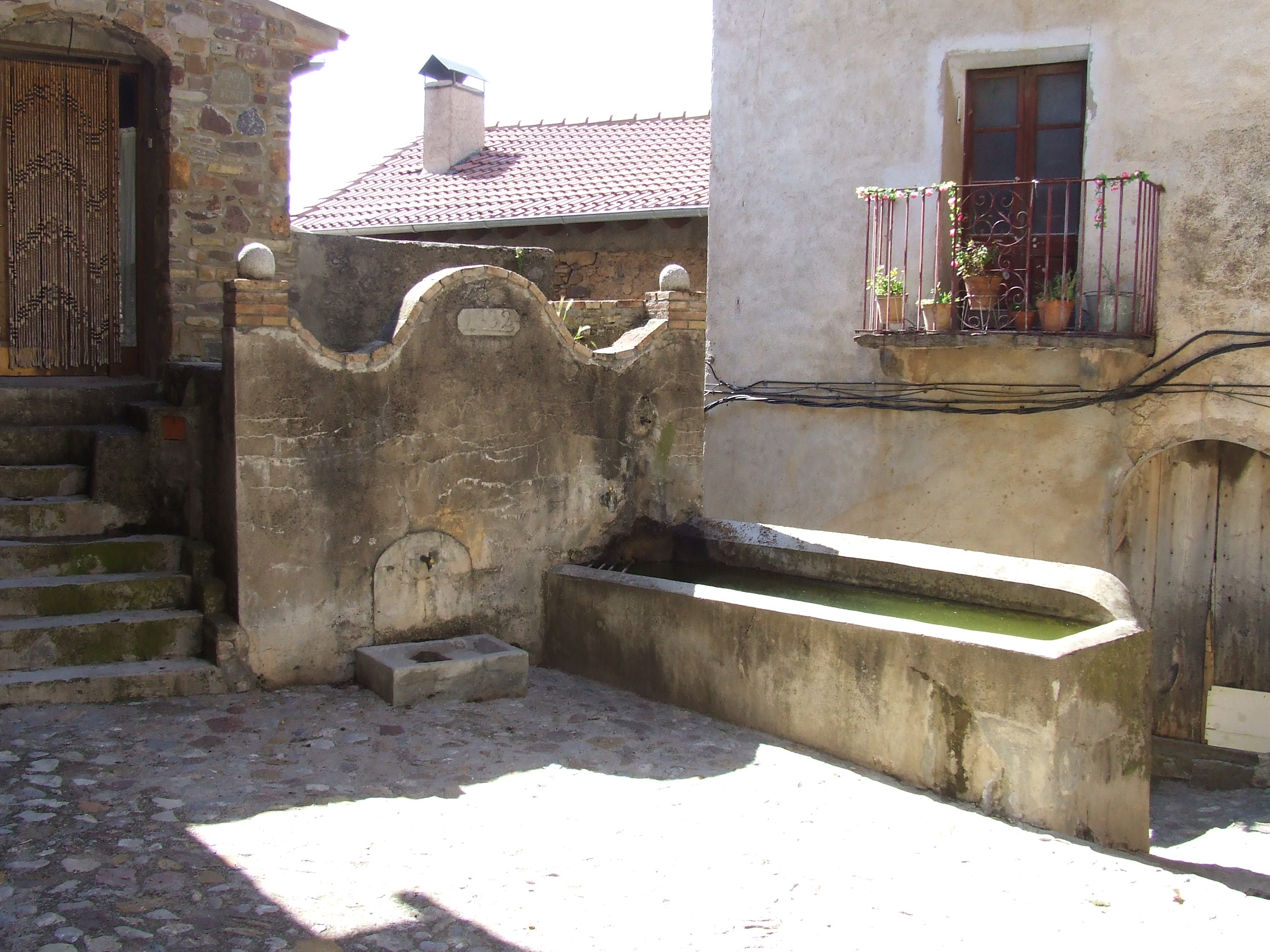 La Font Pública de Serradell (Serradell, Toralla i Serradell, Conca de Dalt, Pallars Jussà)